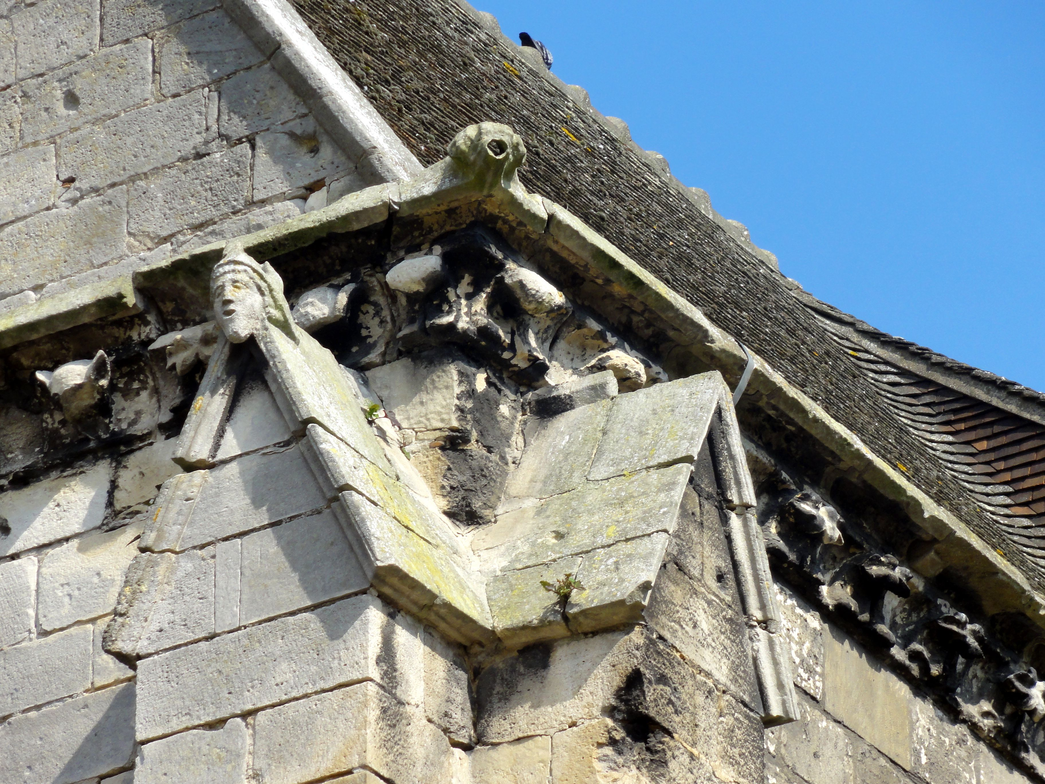 Tête sculptée sur le chaperon du contrefort de droite de l'extrémit de l'ancien croisillon, frise de feuilles d'acanthe et petite gargouille à l'angle.